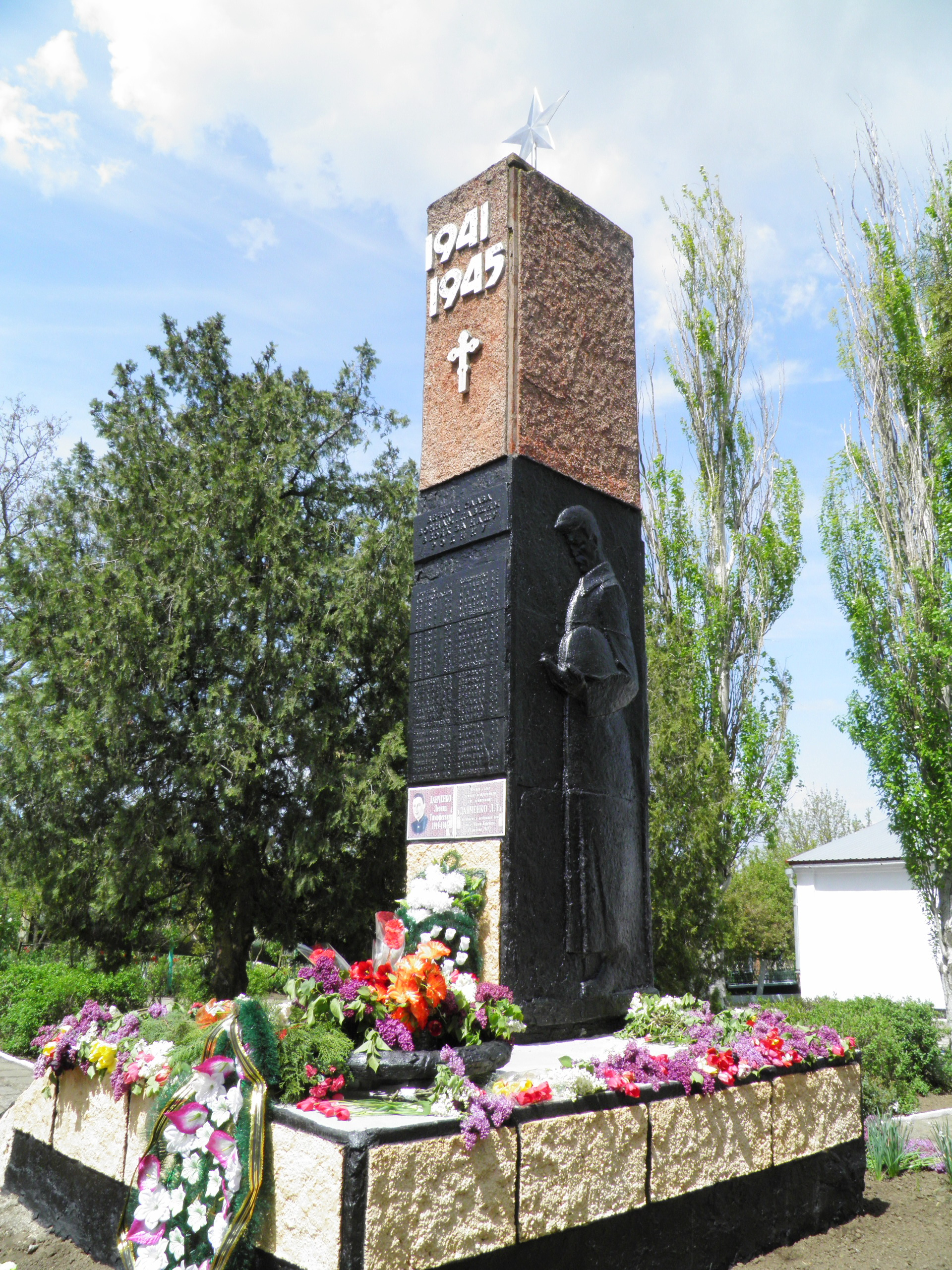 Николаев, посёлок Малая Корениха, памятник жителям посёлка, погибшим в Великую Отечественную Войну